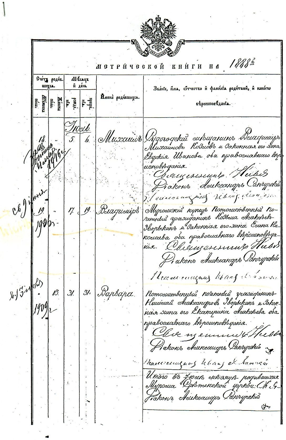 Свидетельство о рождении Зворыкина В.К., в котором указан его подлинный год рождения.